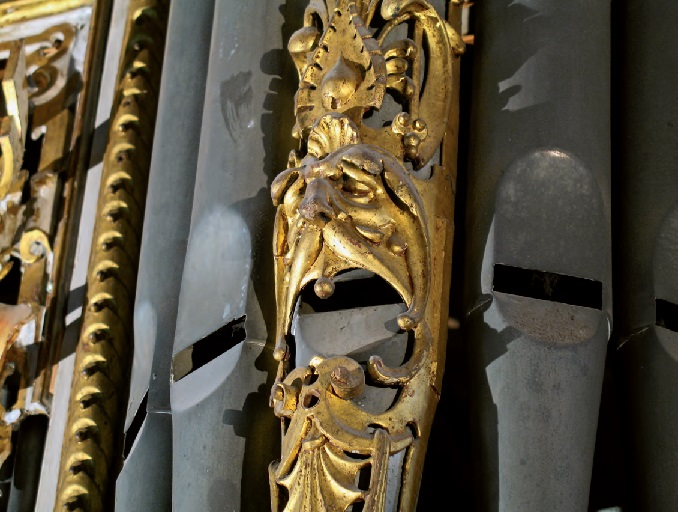 Gröninger Orgel der Martinikirche in Halberstadt, Sachsen-Anhalt, Deutschland